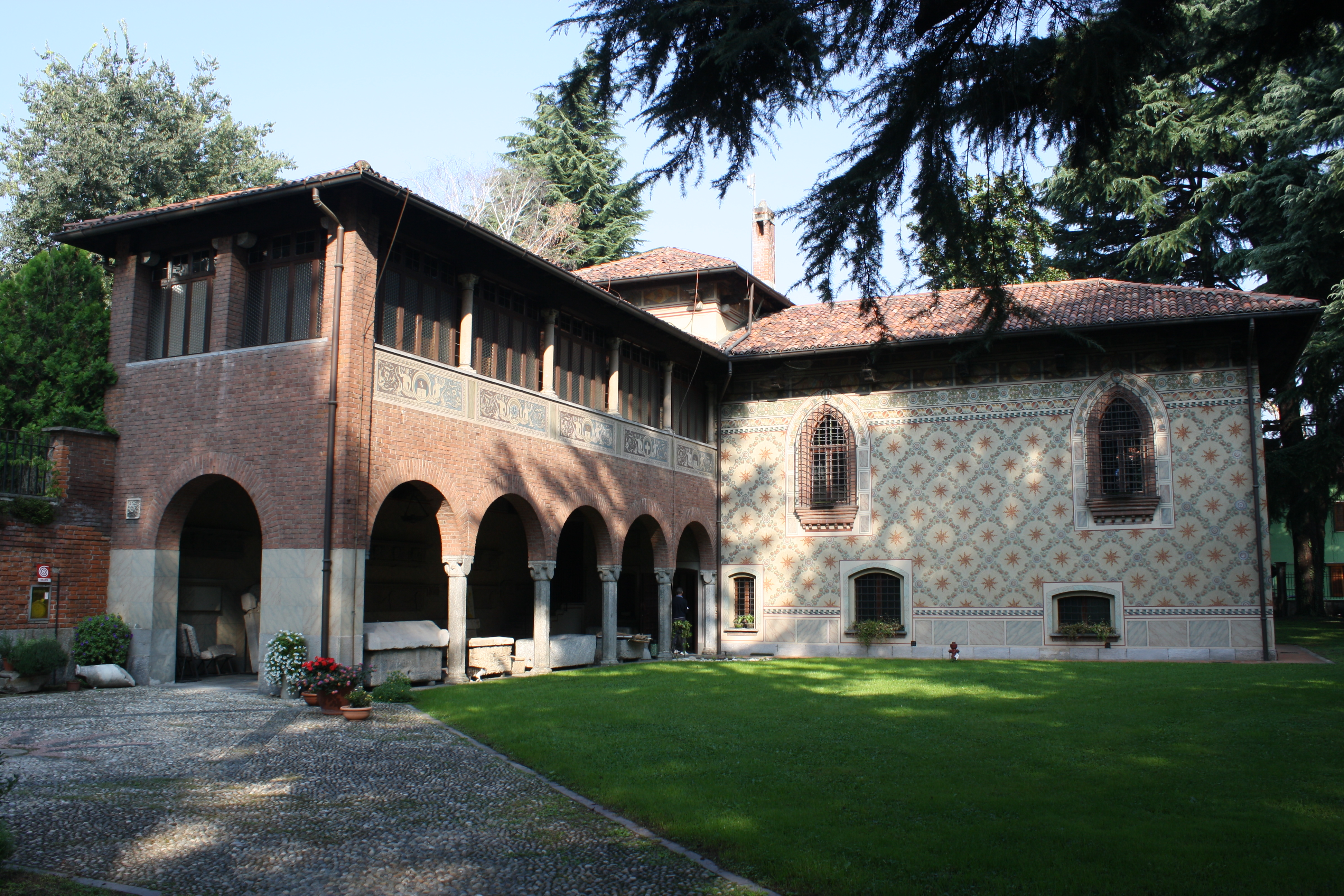 Museo Civico "Guido Sutermeister" (Legnano) This is a photo of a monument which is part of cultural heritage of Italy.